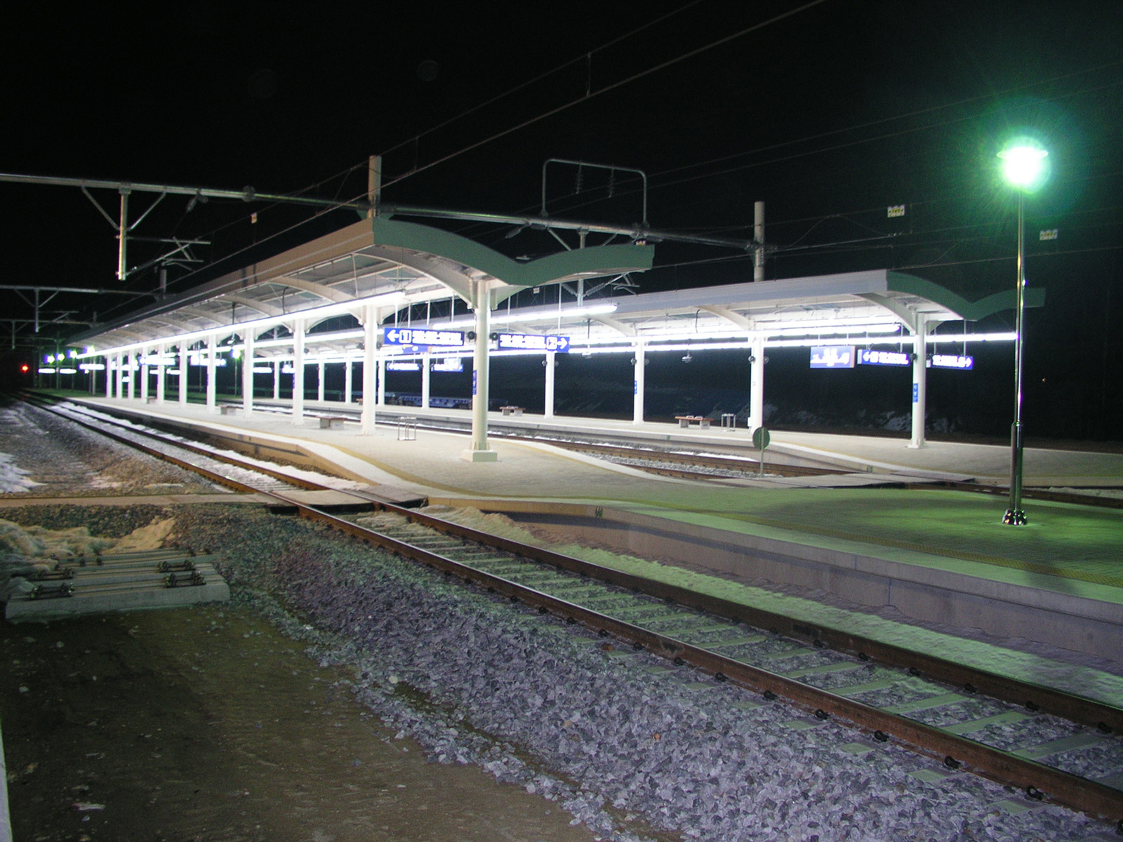 Les quais de la gare de Jipyeong, la nuit.